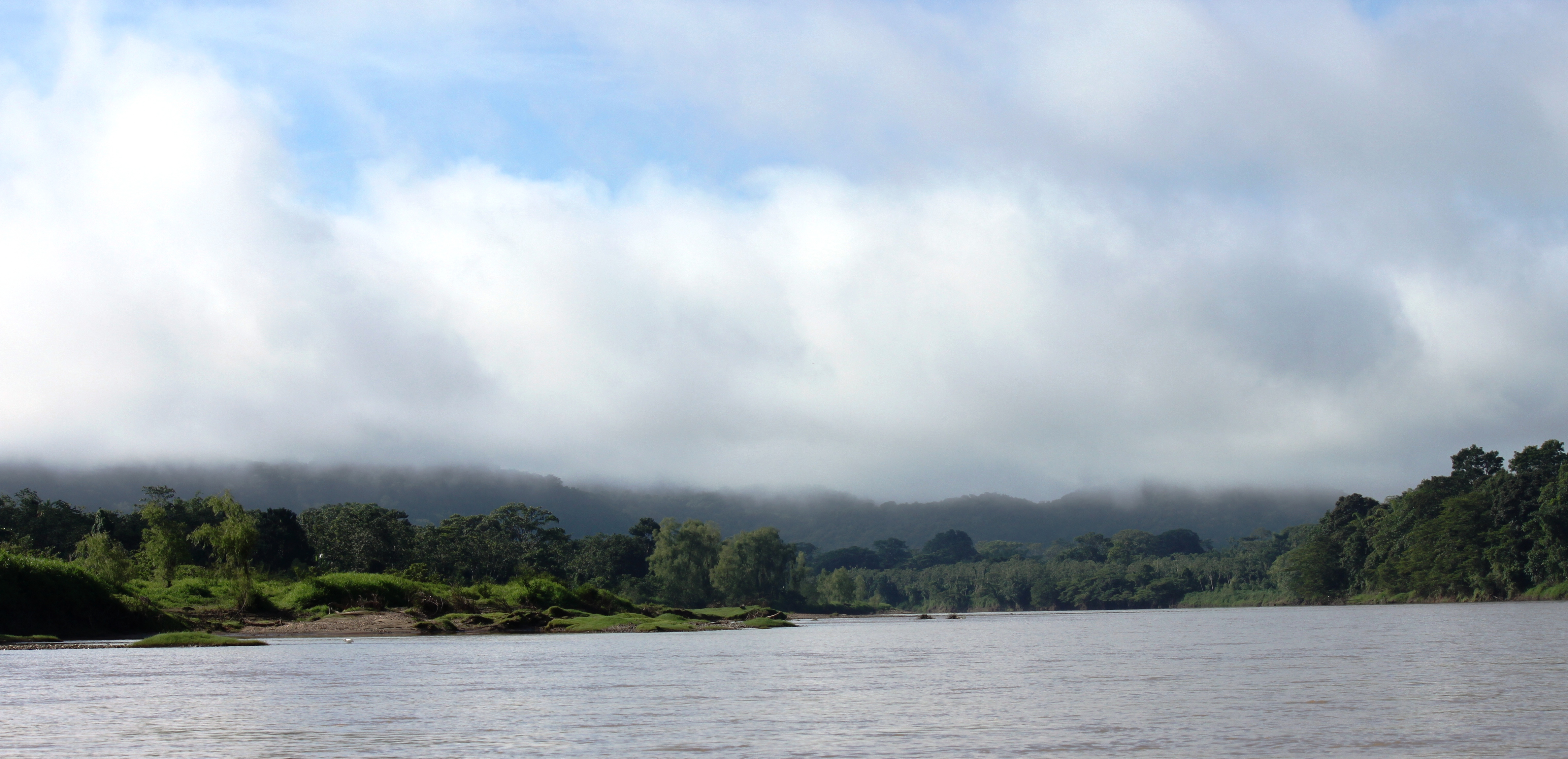 Panorámica del Río Patuca, municipio de Wampusirpi, departamento de Gracias a Dios dentro del territorio indígena miskito del concejo territorial de BAKINASTA, zona cultural de la RHBRP. This is an image of the Biosphere Reserve: Río Plátano Biosphere Reserveh